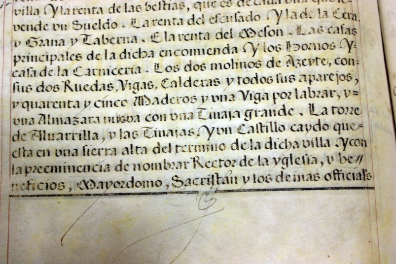 Fragmento del libro de la venta de la villa de Enguera por parte de la Corona en 1575 Enguera, donde se menciona que el castillo estaba caido (en ruinas).